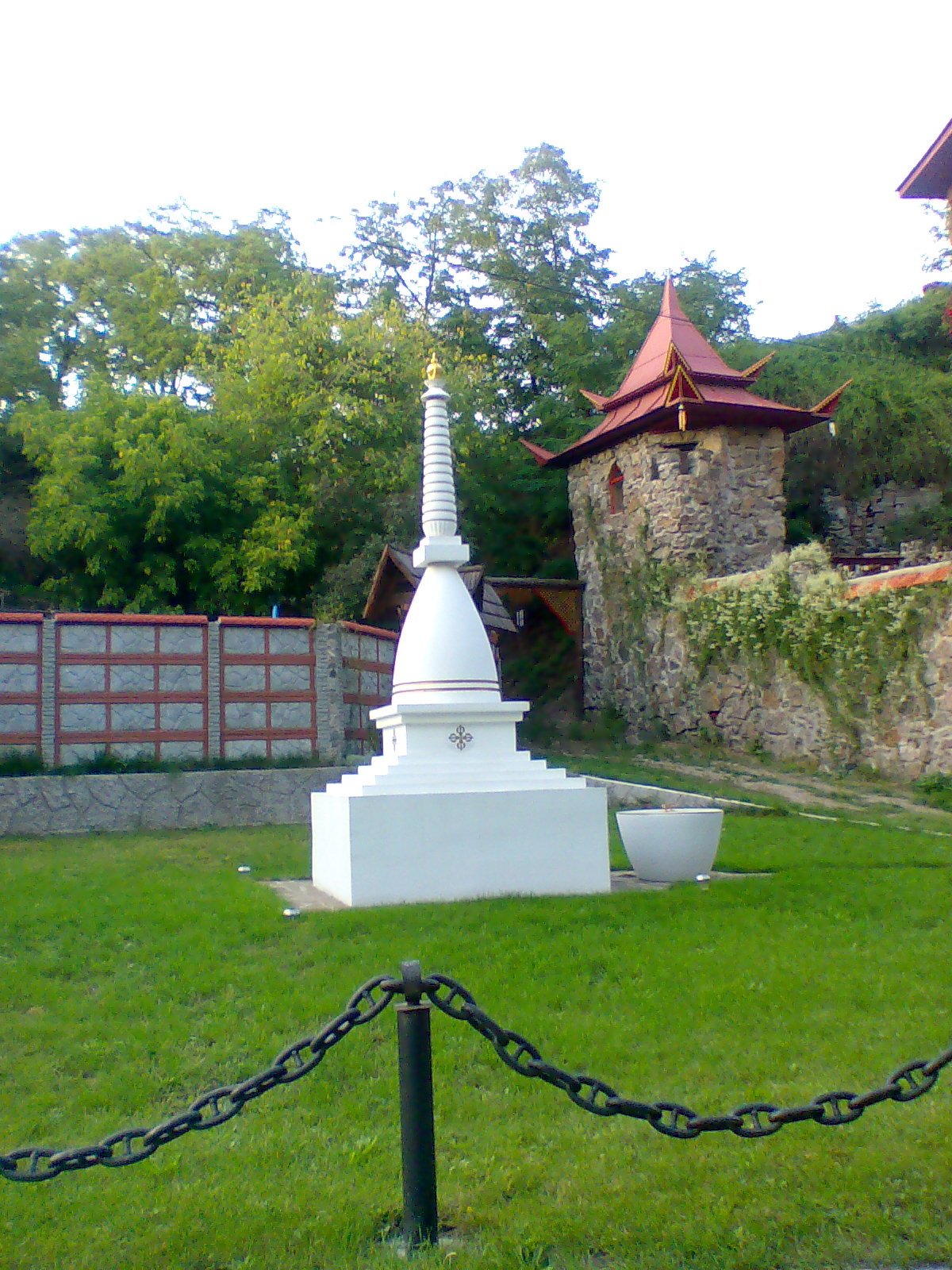 "Білий лотос". Буддистський храм в Черкасах